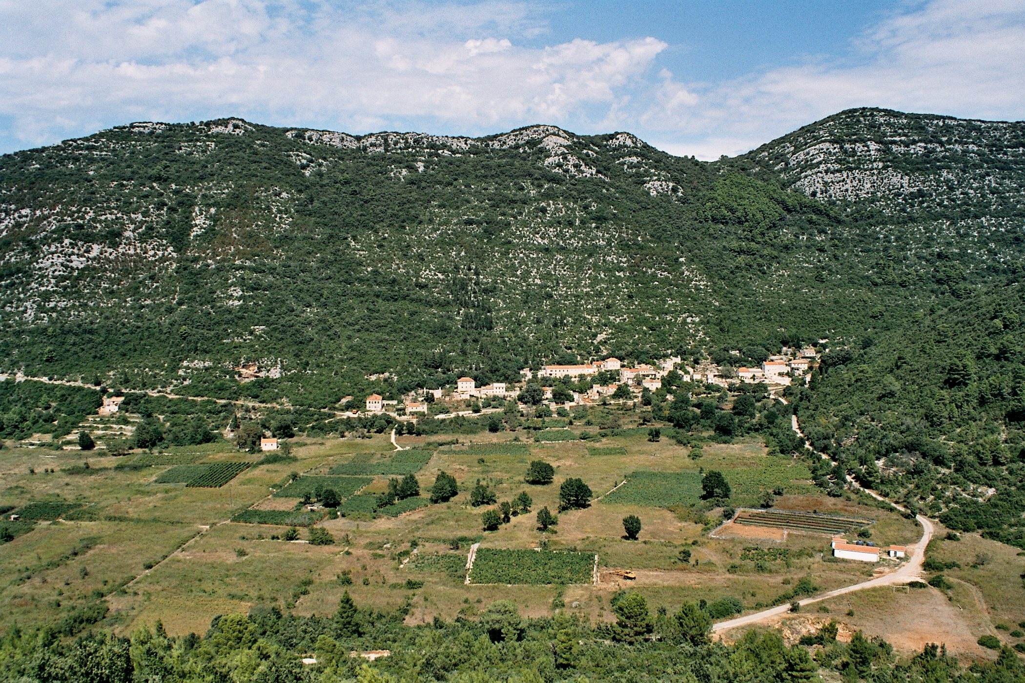 Blato, naselje na Mljetu, Hrvatska